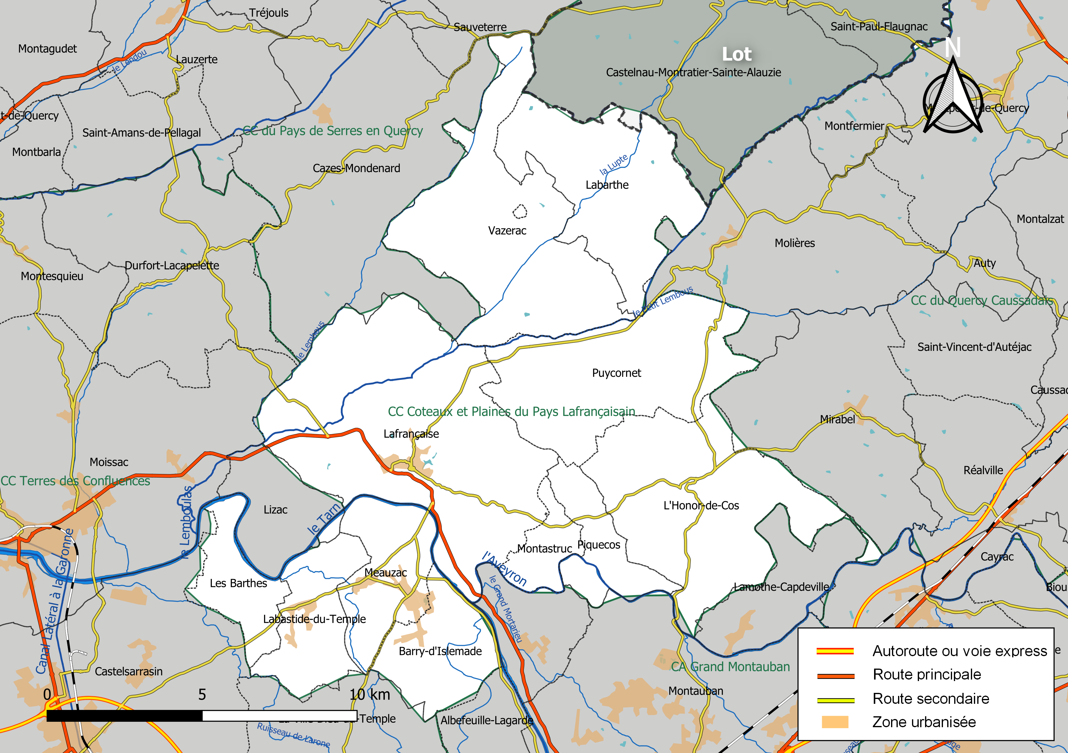 Carte géographique de la Communauté de communes Coteaux et Plaines du Pays Lafrançaisain, département de Tarn-et-Garonne, France. Composition au 1er janvier 2019.